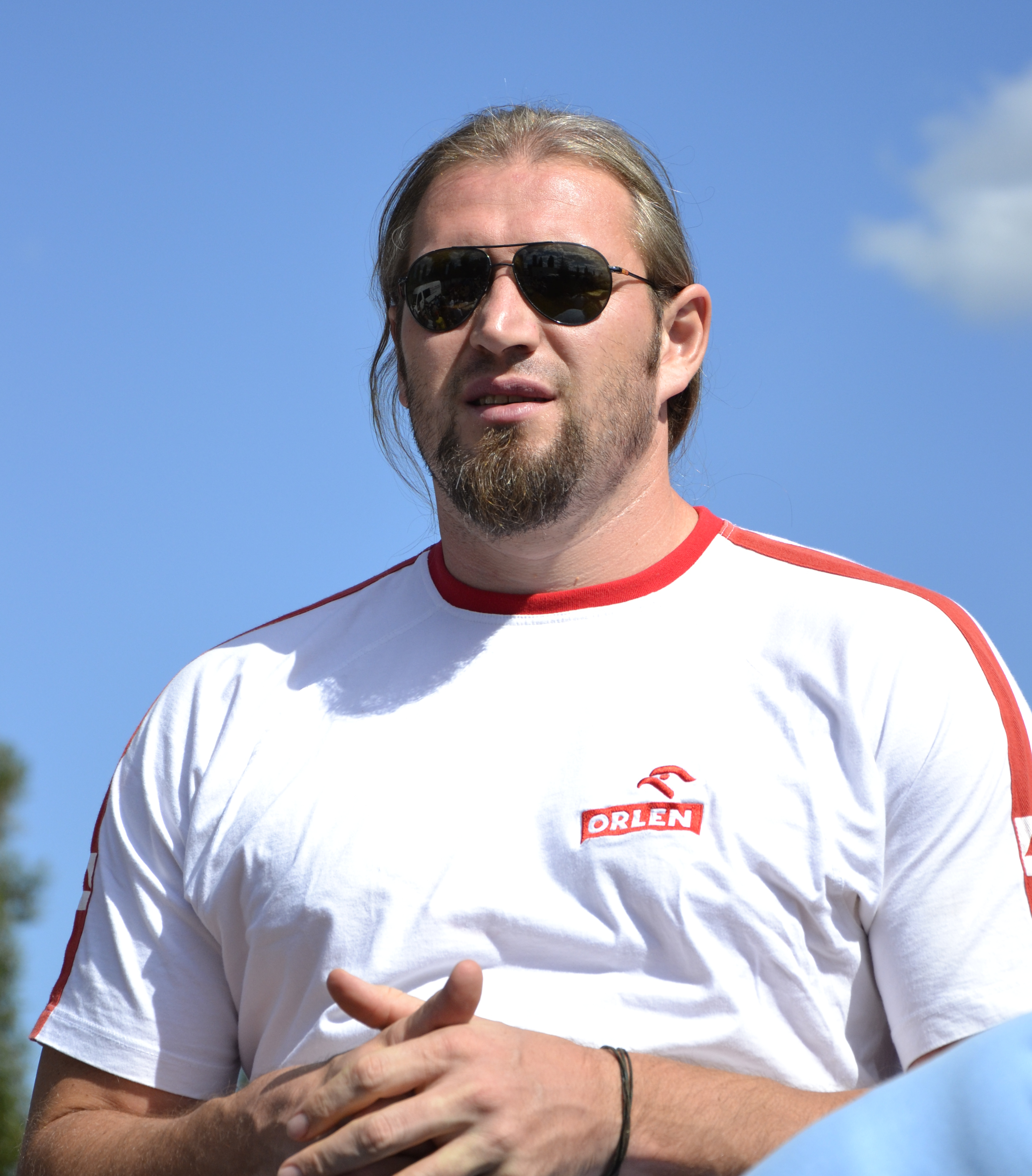 Tomasz Majewski na stadionie Orła podczas 4. Mityngu Kamili Skolimowskiej 25 sierpień 2013